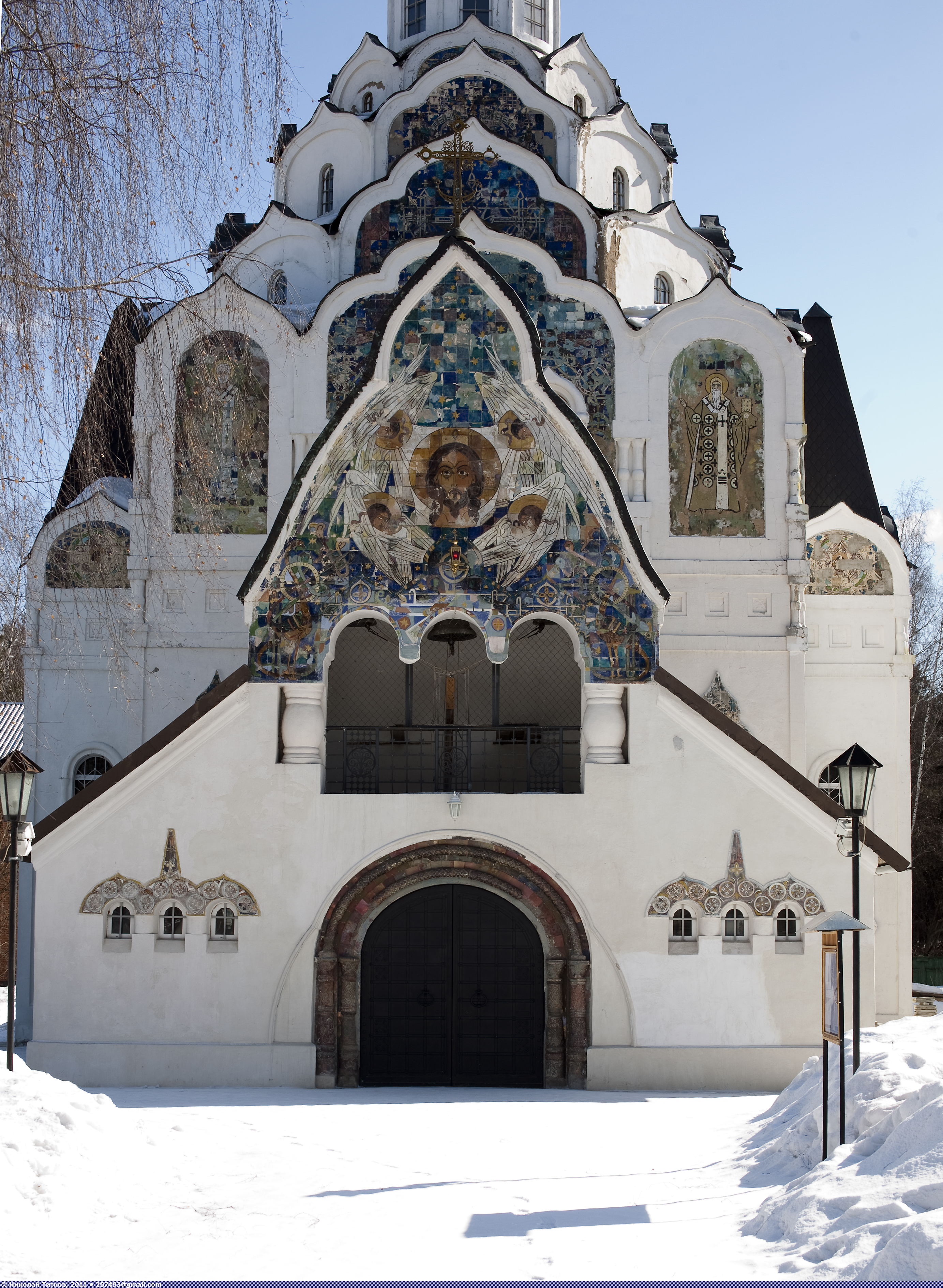 Кубический храм, завершённый главкой на горке кокошников, с пристроенной с запада звонницей, украшенный майоликовыми панно. Интересный образец неорусского стиля, построен в честь 300-летия Романовых по рисунку С. И. Вашкова, первоначально предполагался к освящению как Николо-Алексиевский. По ряду сведений так и не был освящён. В послереволюционные годы служил общежитием, складом. Открыт в 1989, освящён как Спасский, отреставрирован. Карточка храма